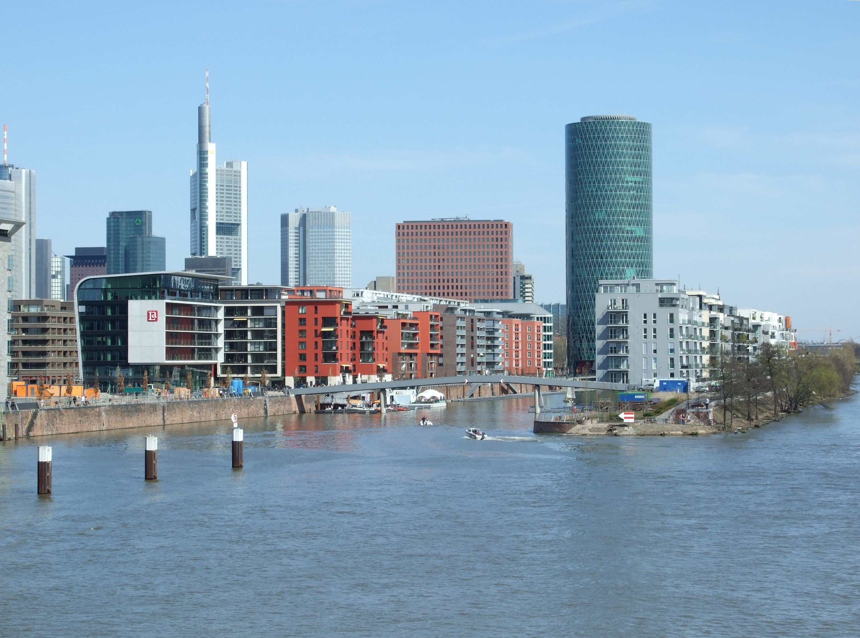 Westhafen von Main-Neckar-Bruecke aus